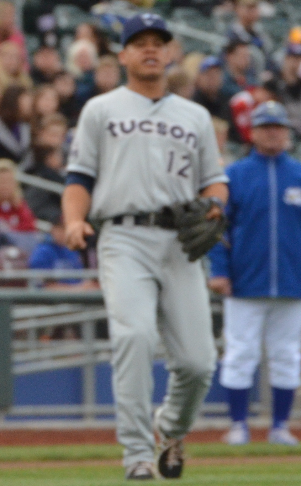 Jesús Merchán